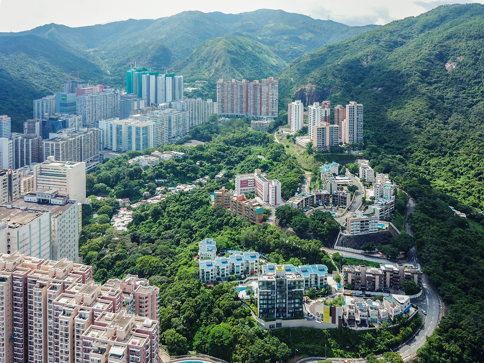 Fo Tan Residental view